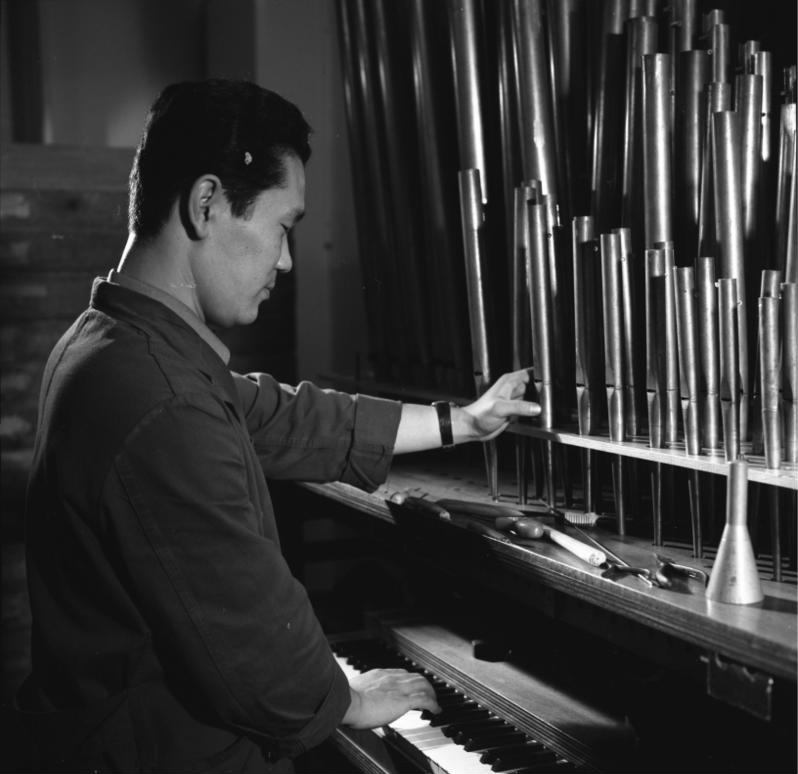 Orgelbauwerkstatt Klais, Bonn